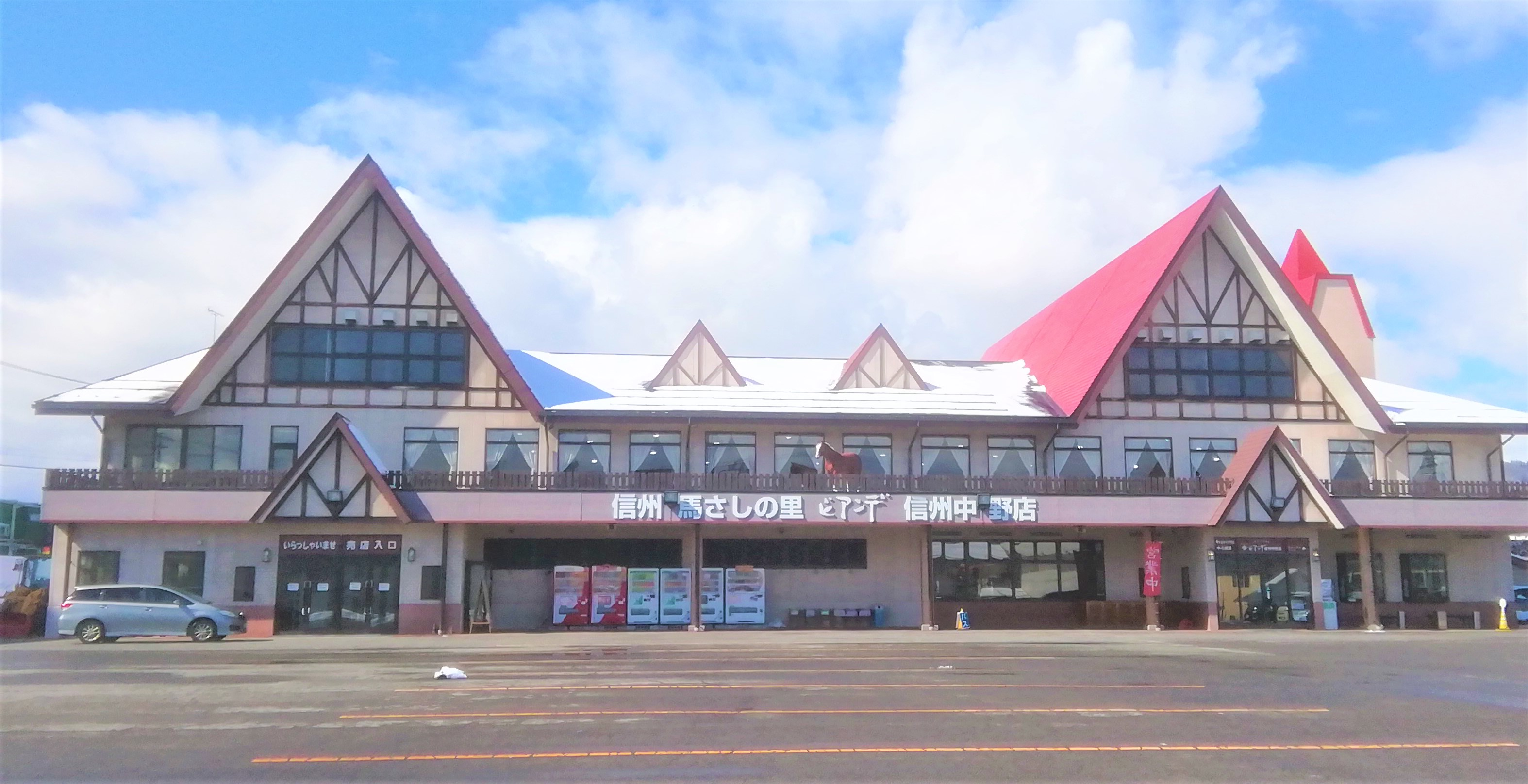 ビアンデ（中野市）